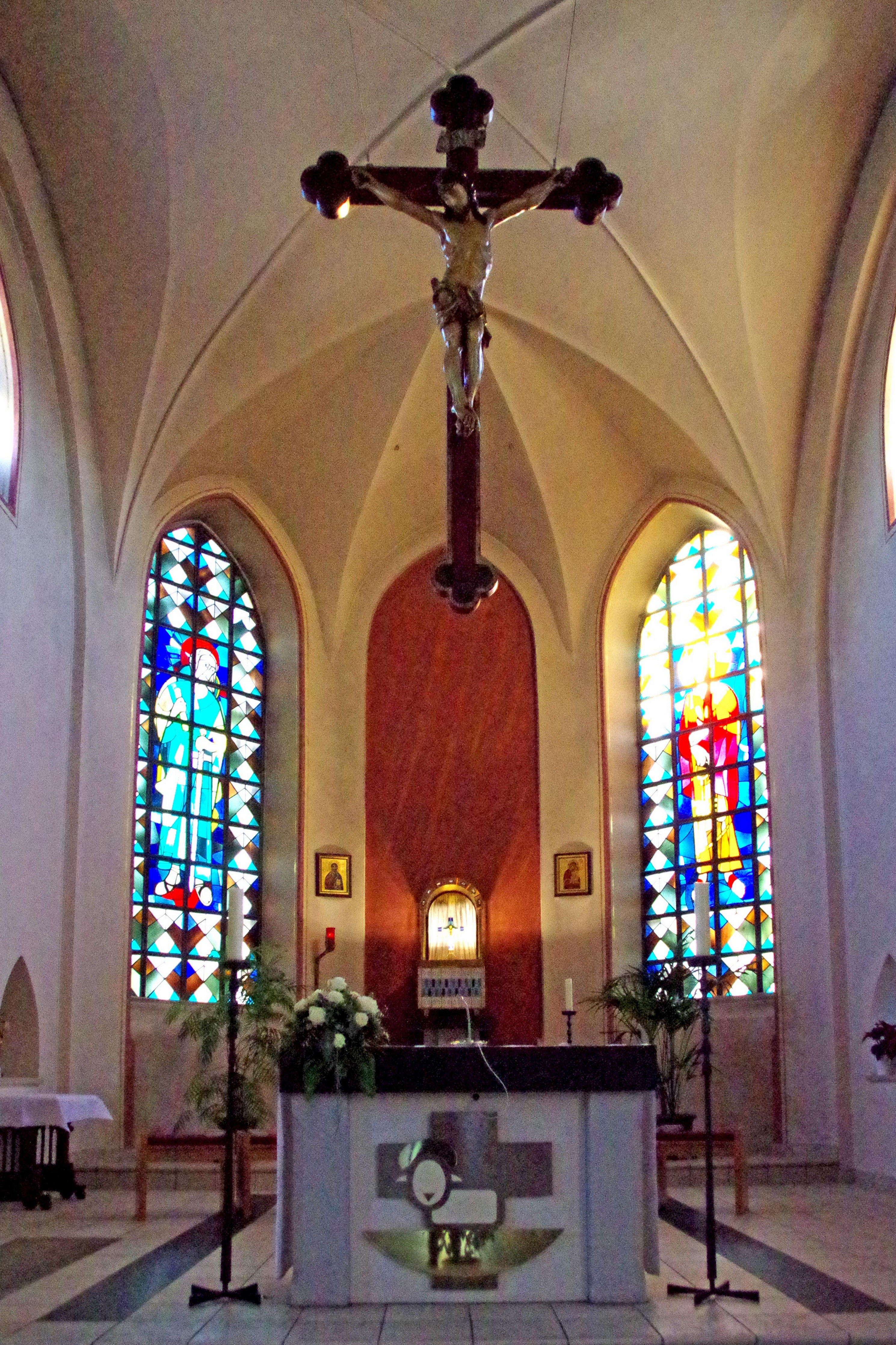 St. Peter und Paul (Kesternich), Altarraum mit dem alten Kreuz